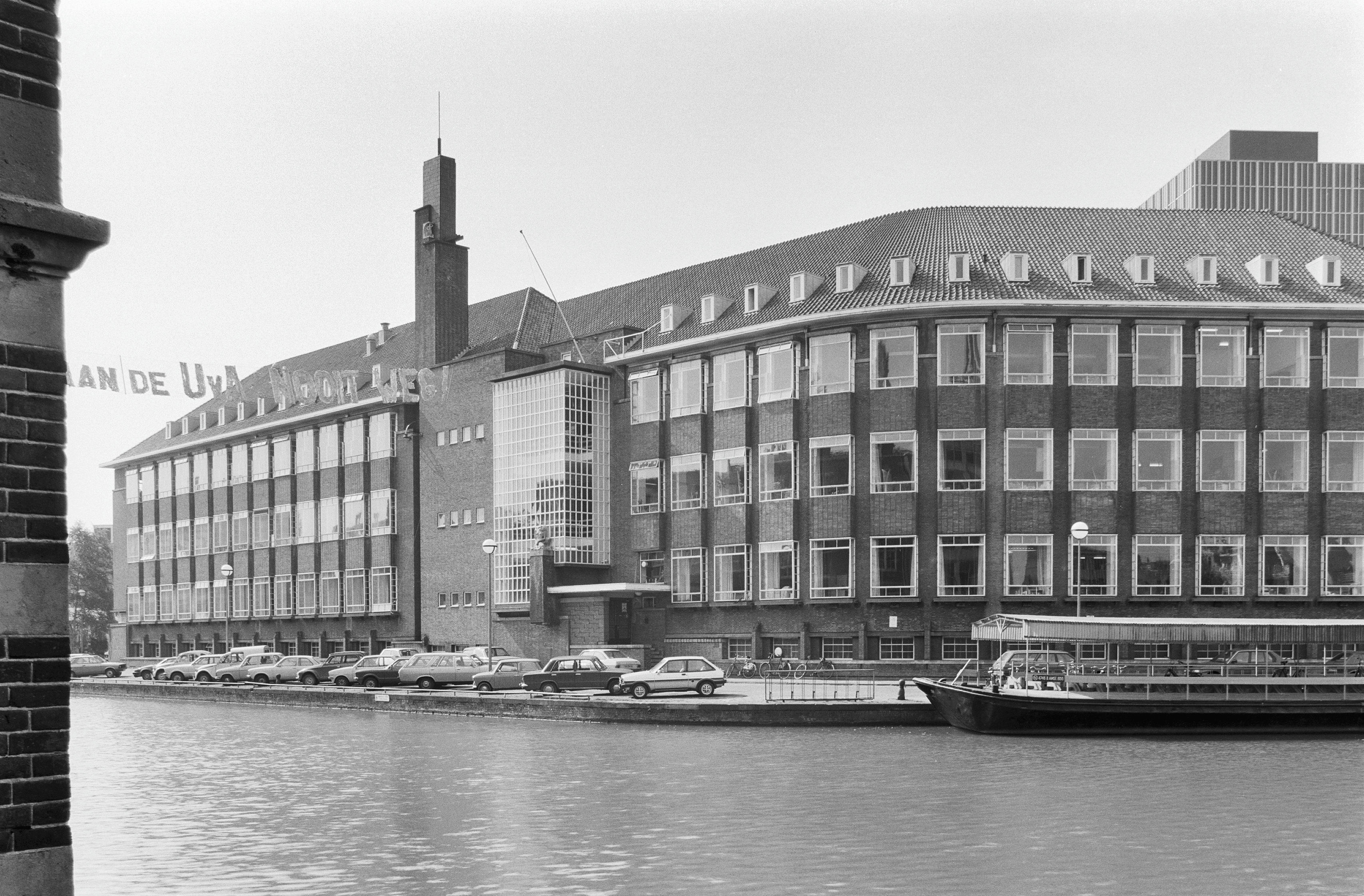 Nw.Prinsengracht 130, voormalig Geologisch Instituut overzicht gedeelte met hoofdingang (1930). Gemeentelijk monument